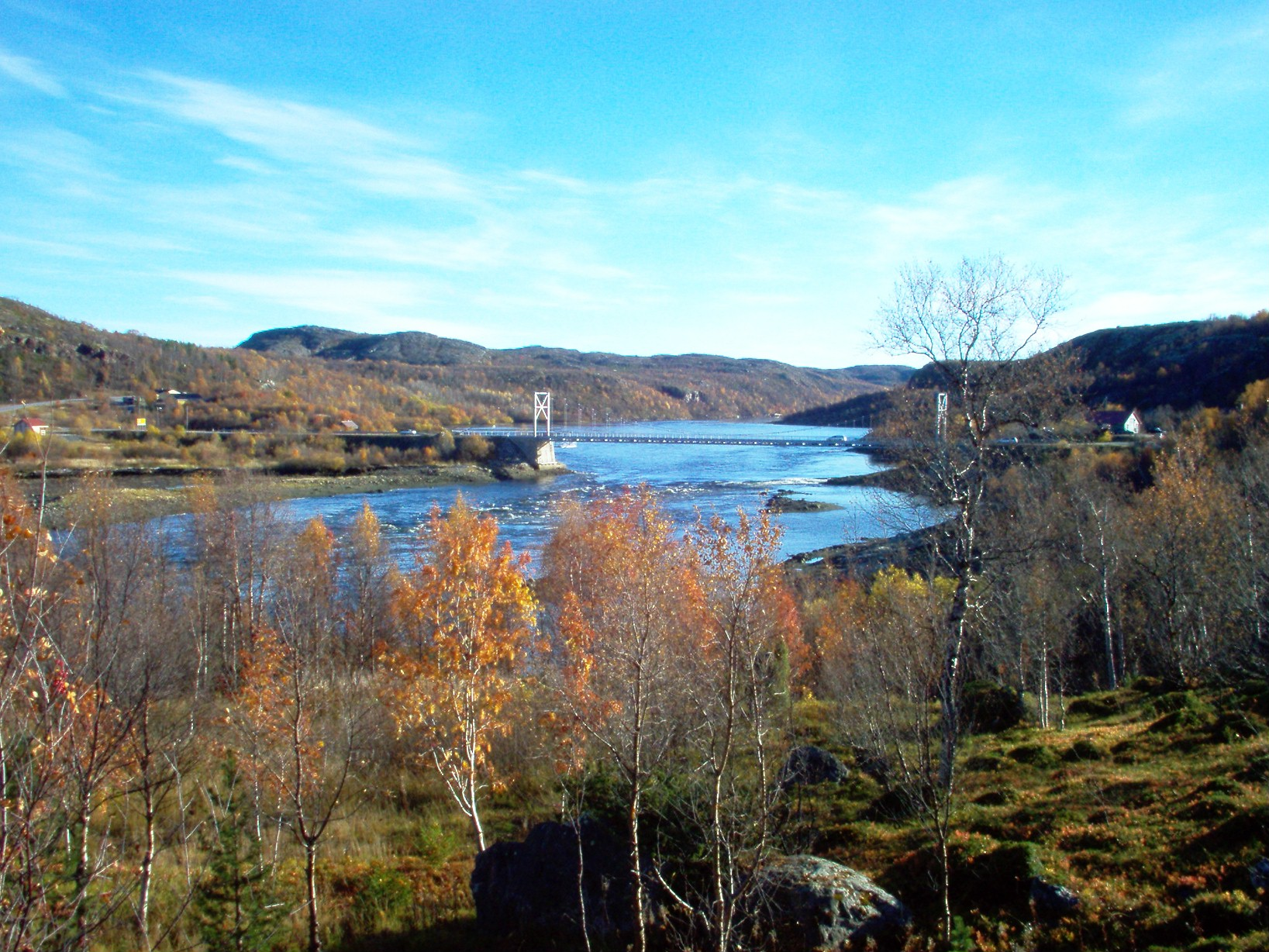 Elvenes, Sør-Varanger, Norway